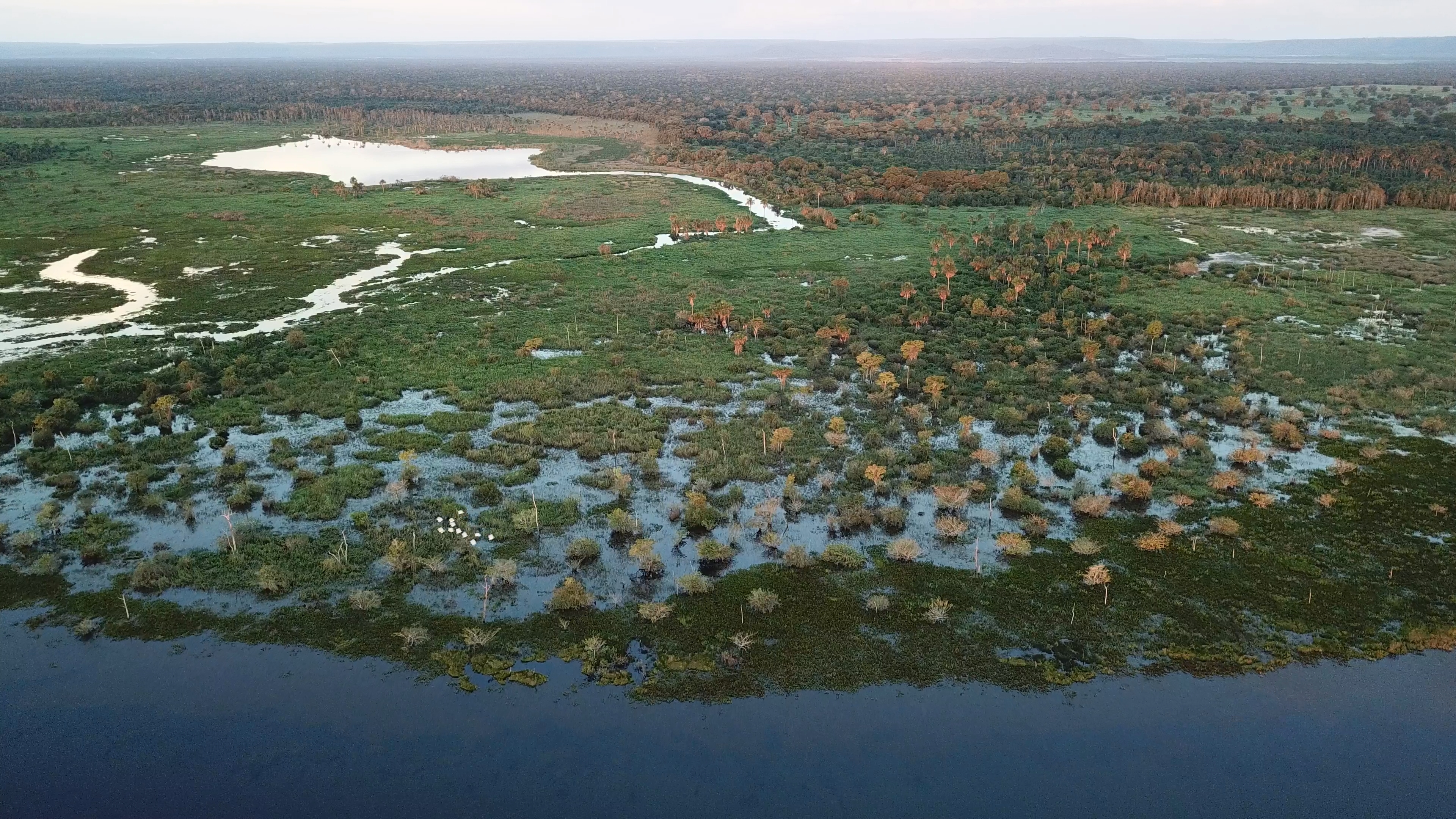 Baia localizada dentro da Fazenda Toca do Nelore, no municipio de Itiquira MT na parte que abrange o Pantanal Matogrossense.